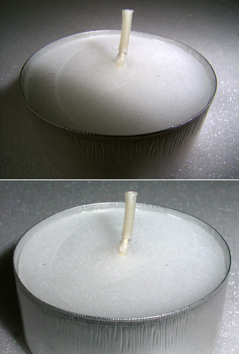 Abschattung des eingebauten Blitzgeräts. Der Arbeitsabstand für etwa gleichen Abbildungsmaßstab bei 28 mm und bei 85 mm Brennweite (Kleinbild-Äquivalent) beträgt bei der verwendeten Kamera etwa zwei cm bzw. 15 cm.